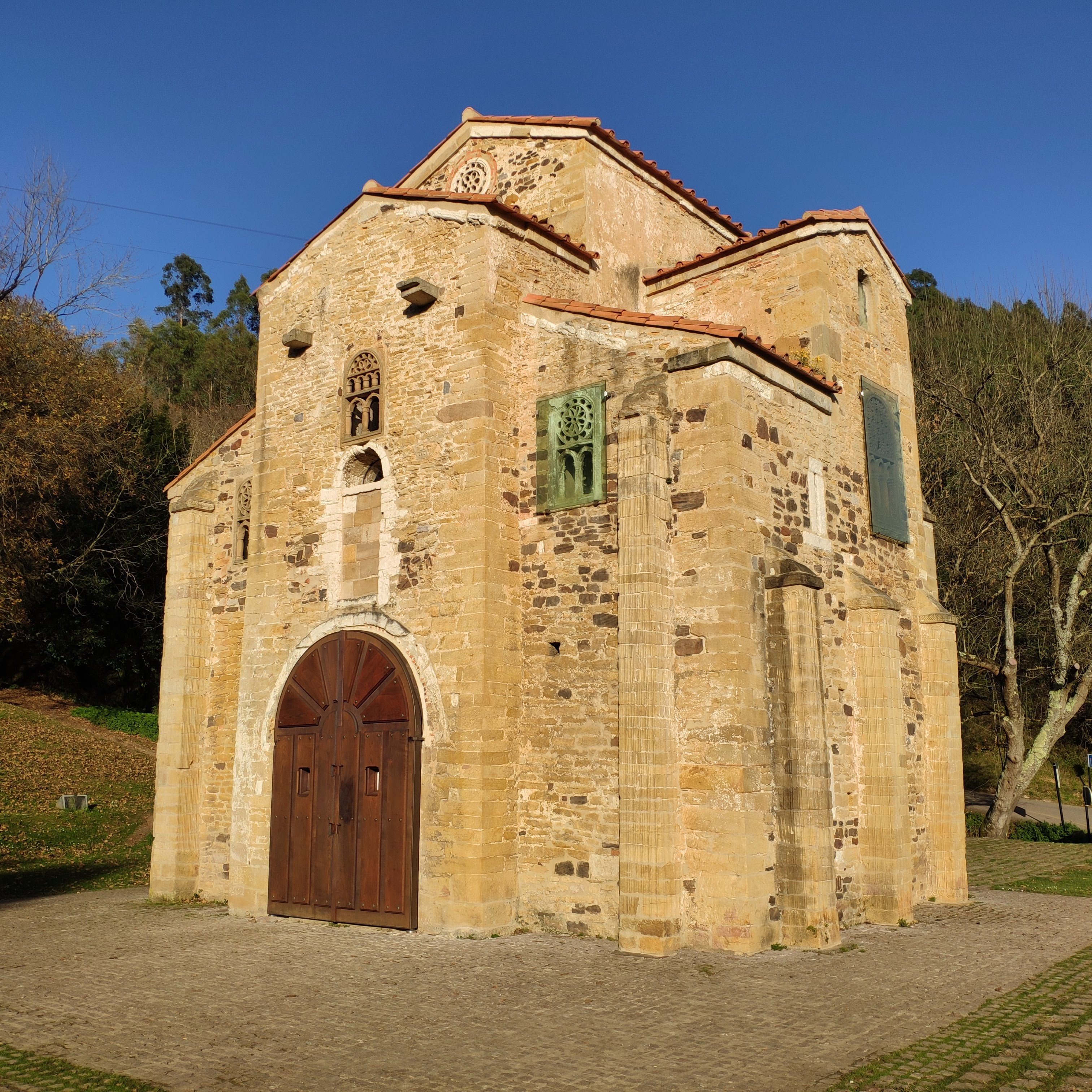 Iglesia de San Miguel de Lillo, Oviedo (2018)